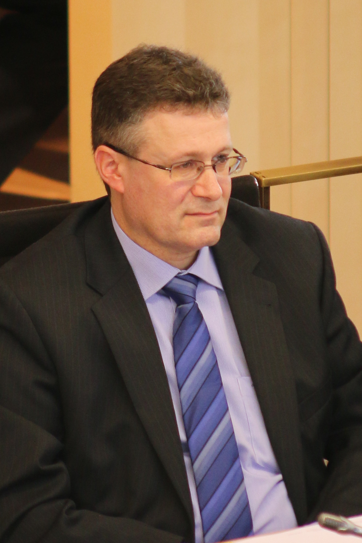 Konstituierende Sitzung des Hessischen Landtags 2014: Michael Reul (MdL) von der CDU-Fraktion